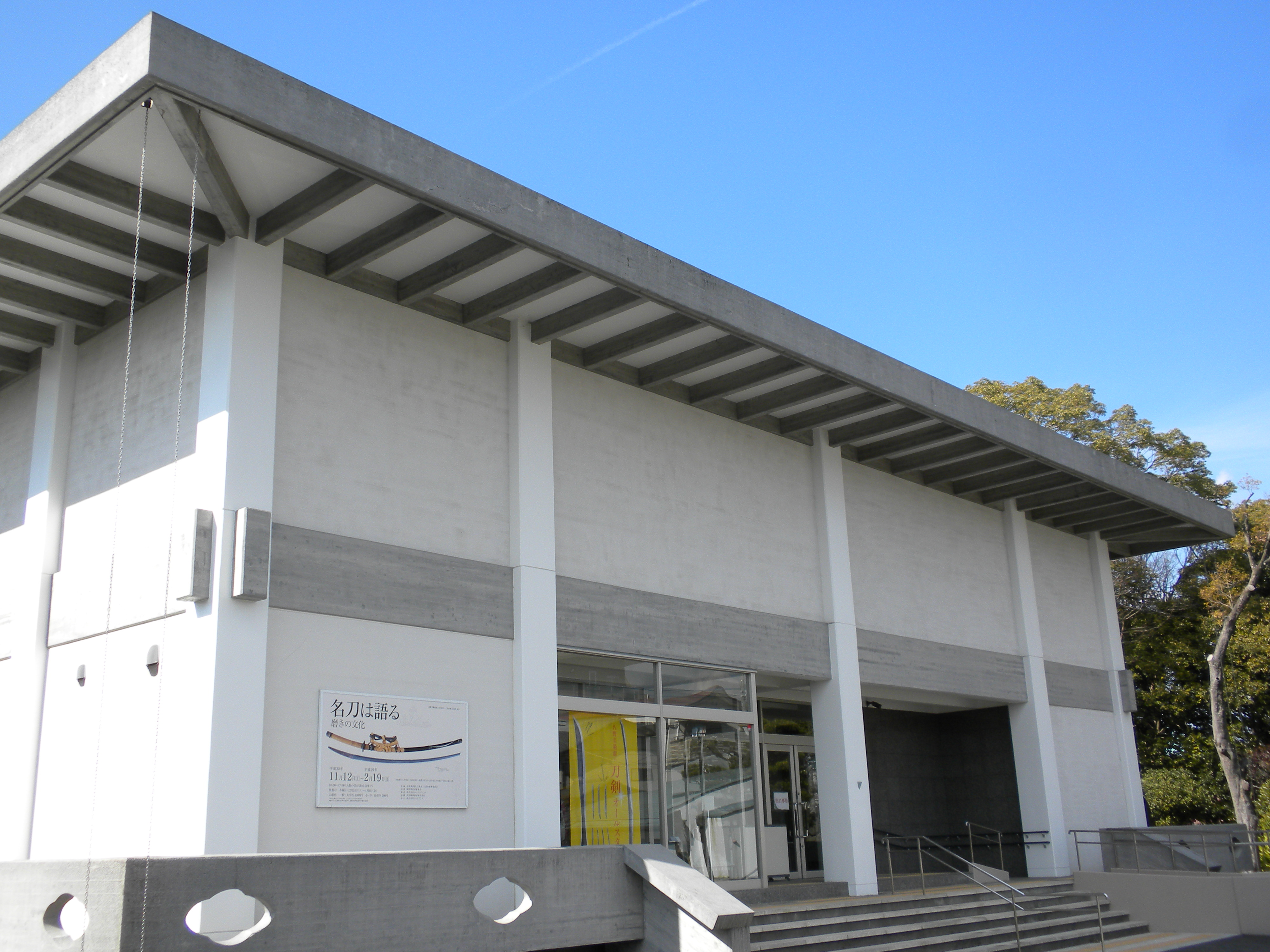 佐野美術館（静岡県三島市）